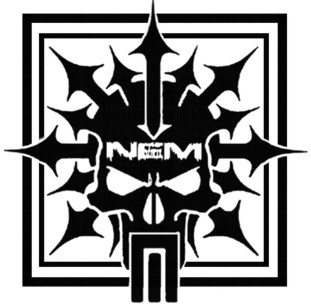 Logo de la banda Argentina NEM